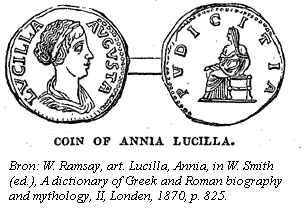 Zie bronvermelding in afbeeling.